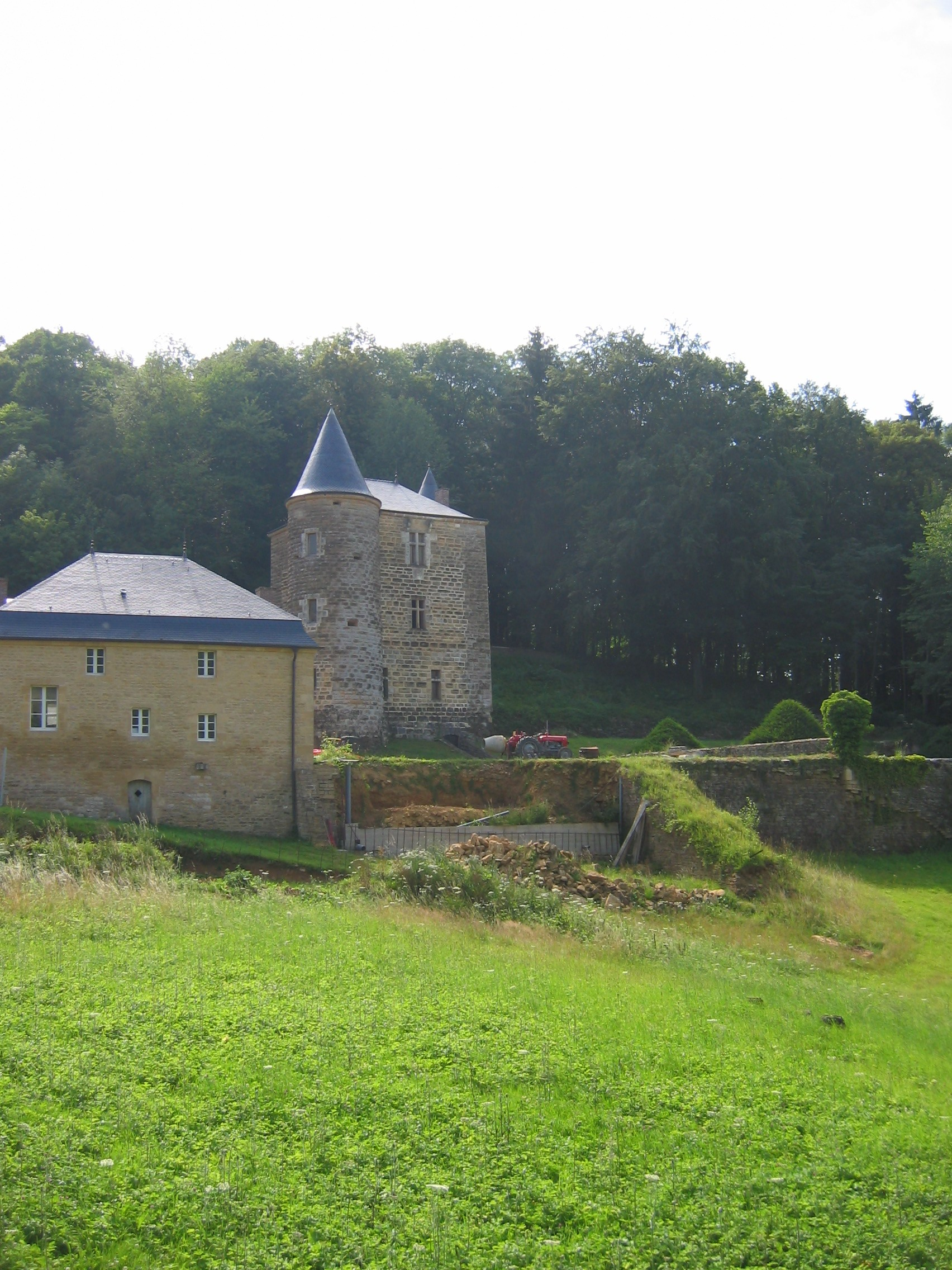 Château de Rocan, Chéhéry, Ardennes, France